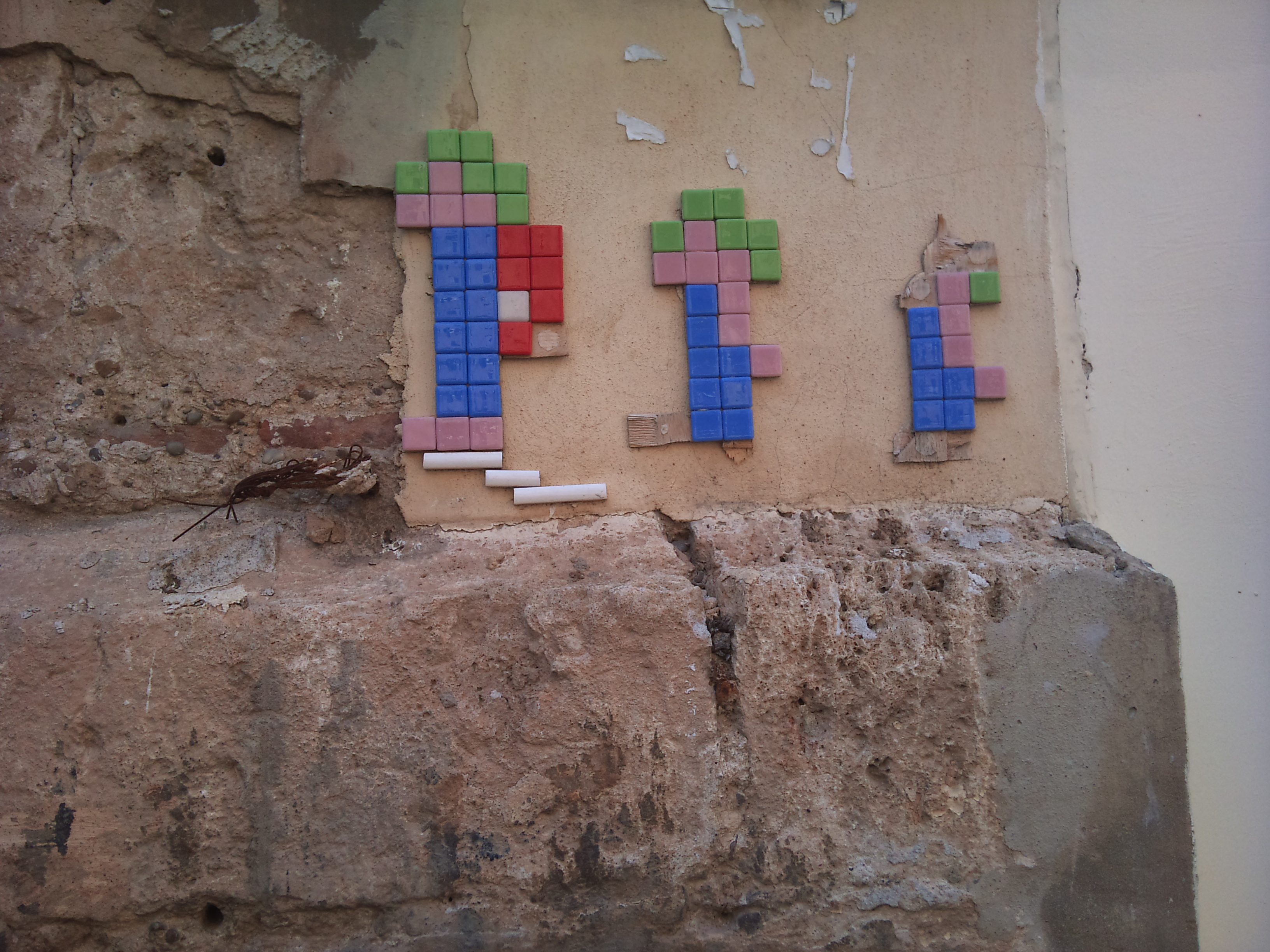 Lemmings